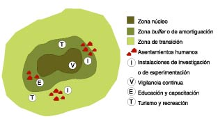 Creación de Buffers (radios de influencia)